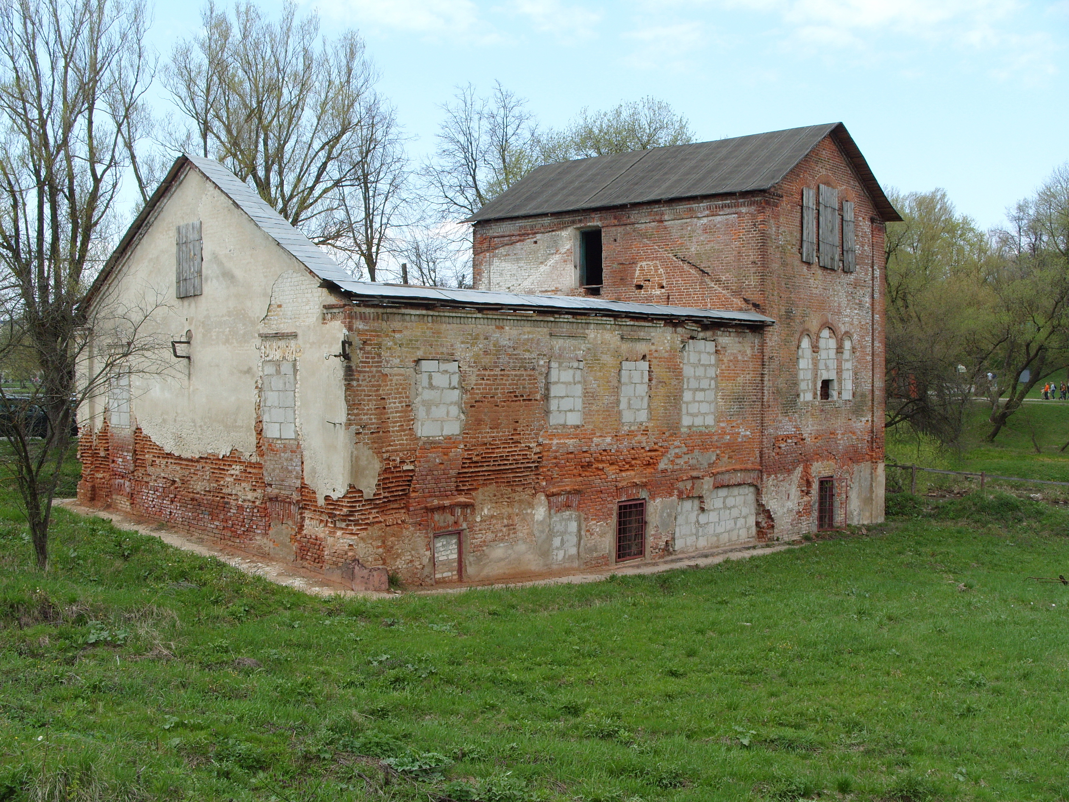 Беларуская (тарашкевіца): Будынак былога млына ў Лошыцы (Менск) This is a photo of Belarusian heritage monument. Reference number: 712Г000266 ( WLM)